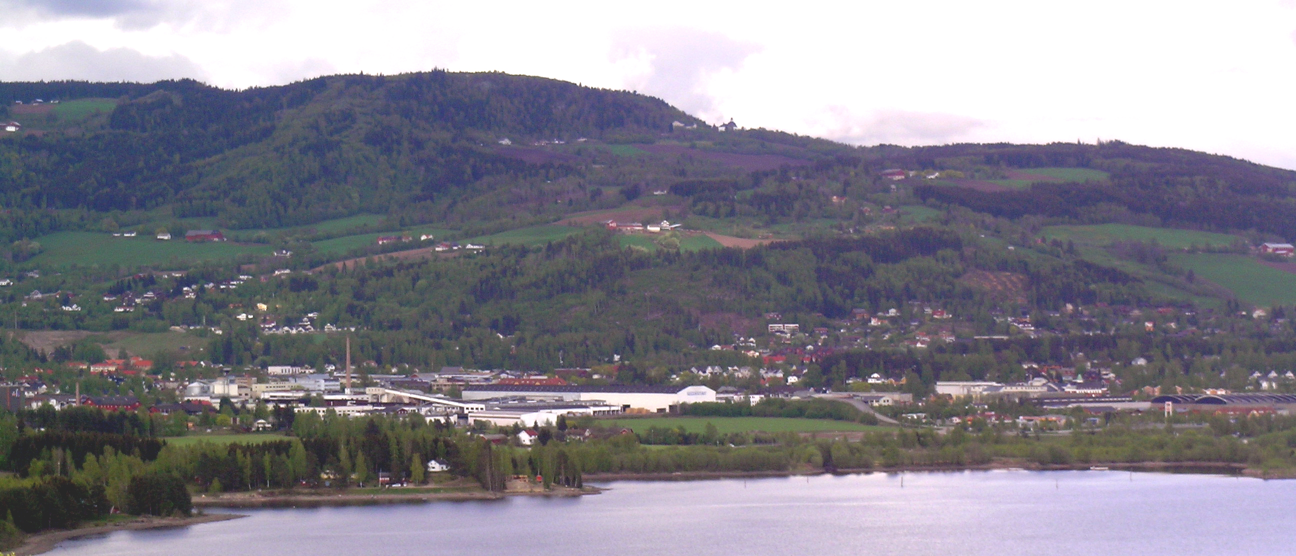 Brumunddal, Ringsaker, Norway.